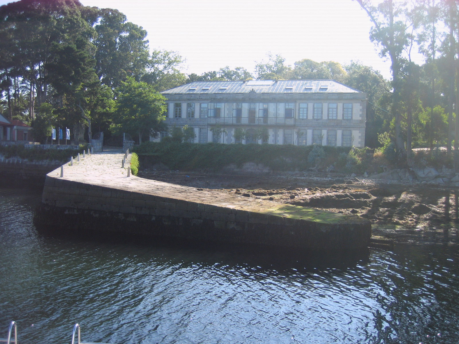 Antiga leprosaria, na Ilha de São Simão (Galiza).